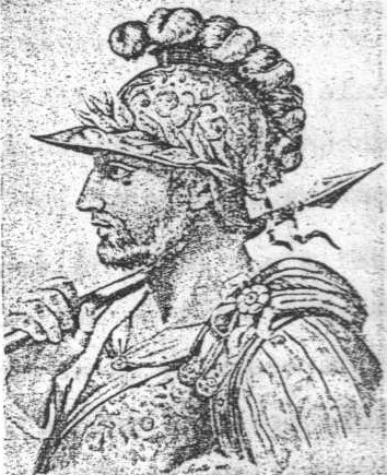 Versión reducida de la imagen original